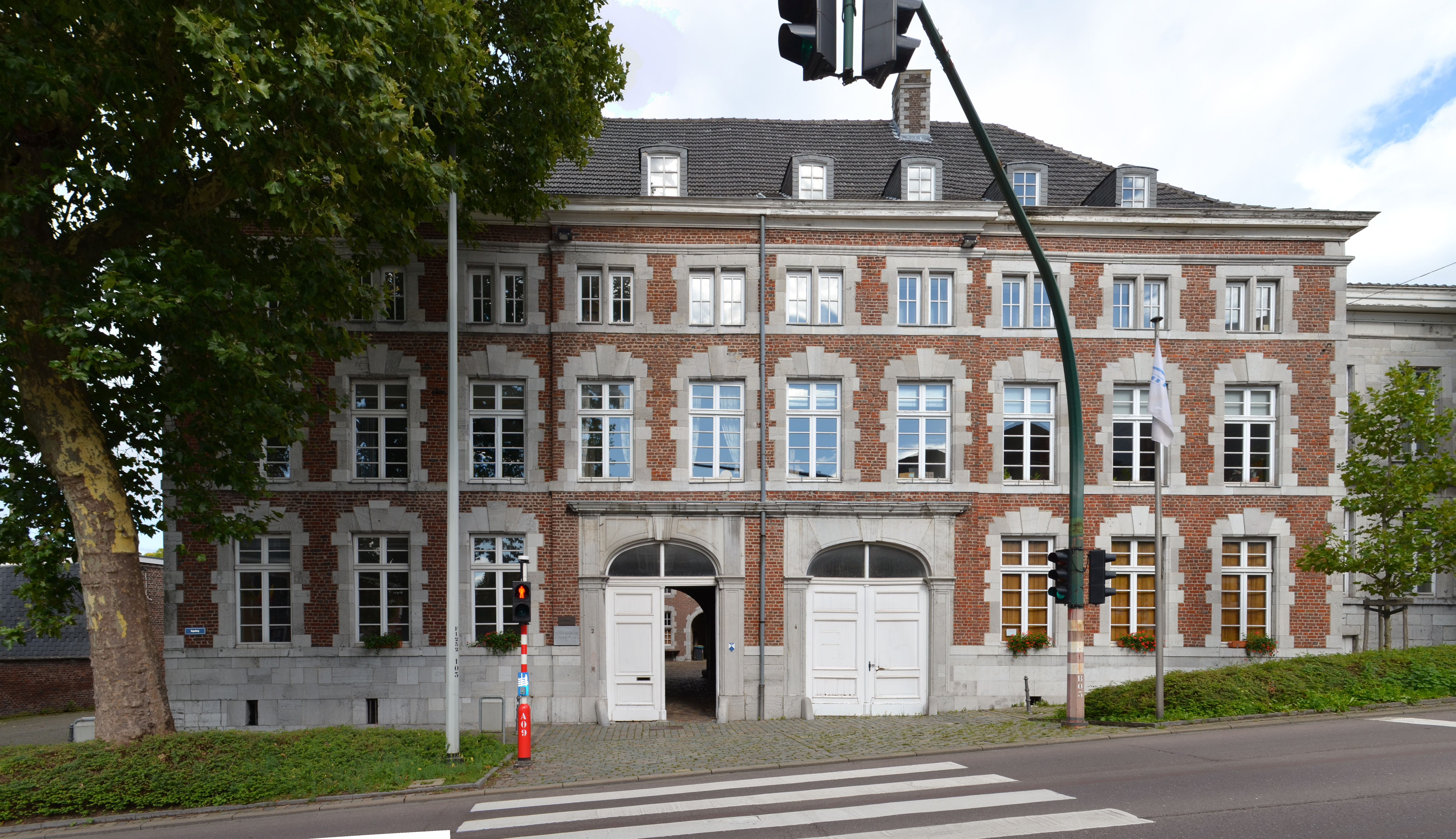 Haus Rehrmann-Fey, Eupen, Straßenfront